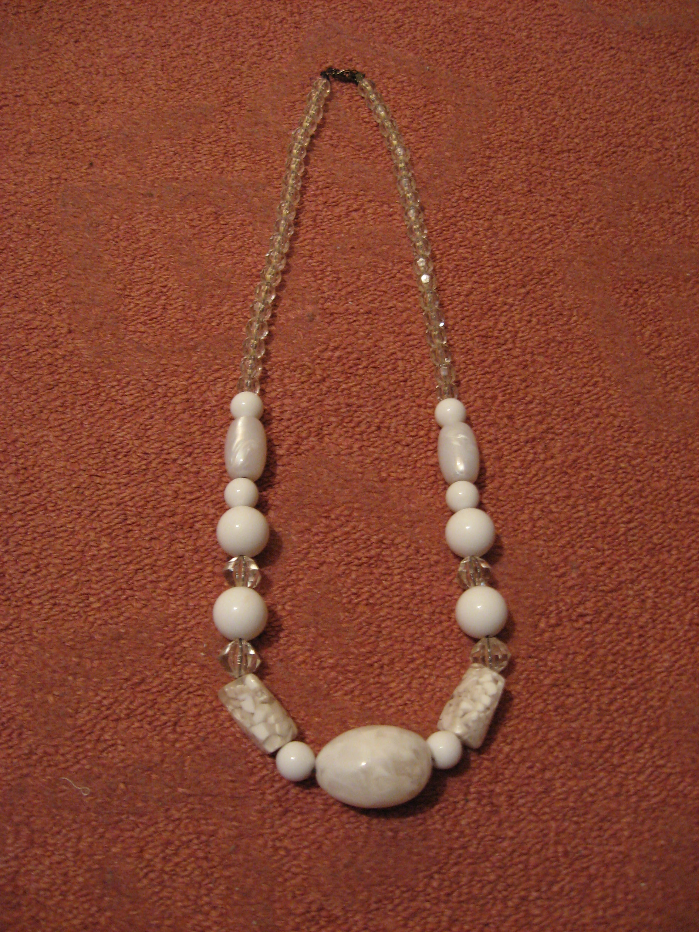 Огрлица.